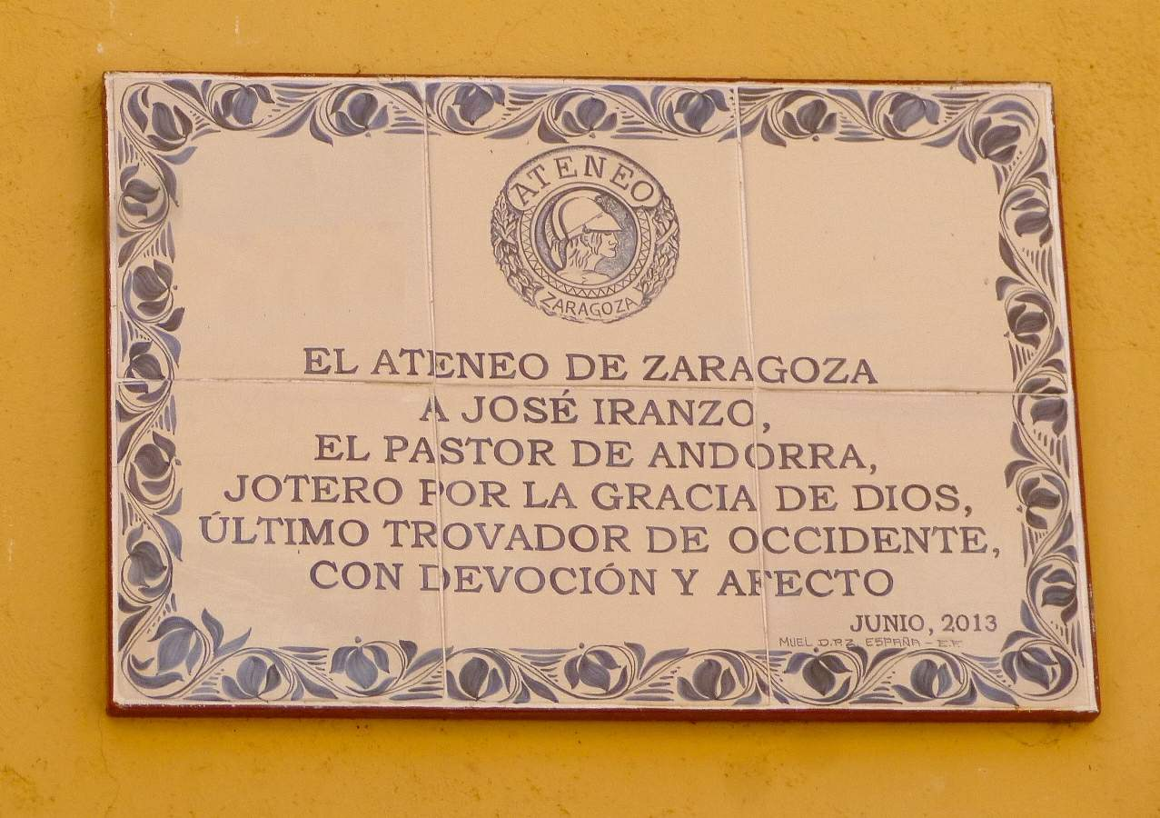 Placa en recuerdo a José Iranzo colocada por el Ateneo de Zaragoza en la villa de Andorra.